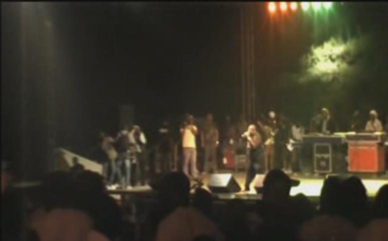 Soundsystem auf dem Fully Loaded 08